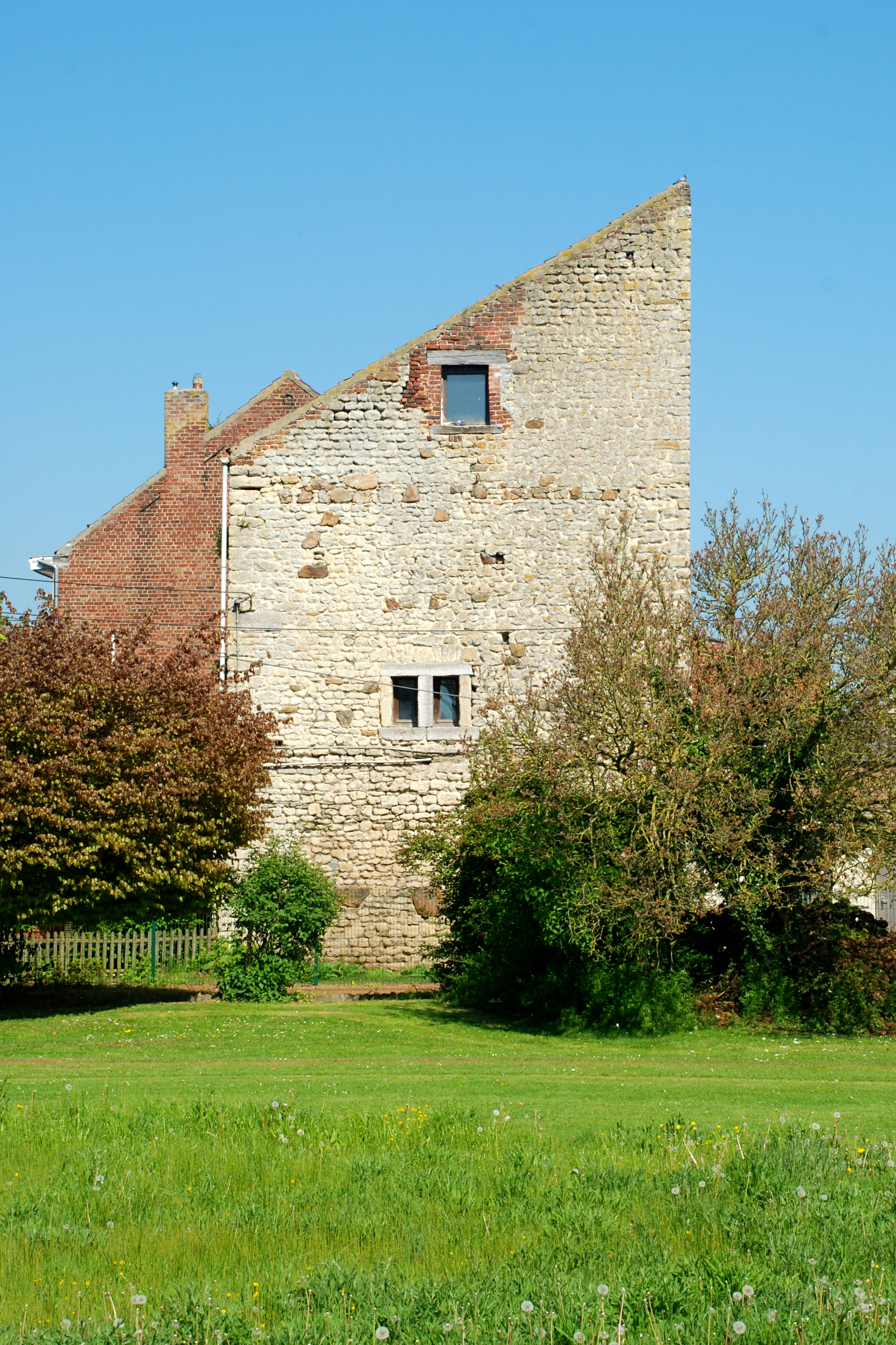 Belgique - Brabant wallon - Mont-Saint-Guibert - Corbais - Tour Griffon du Bois (donjon de Corbais, 13e siècle)